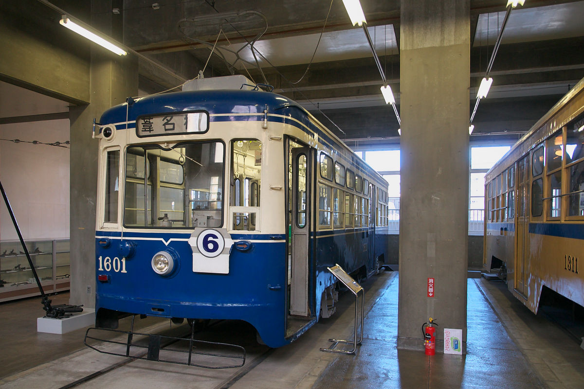 横浜市電1600形（1601）、横浜市電保存館の保存車。